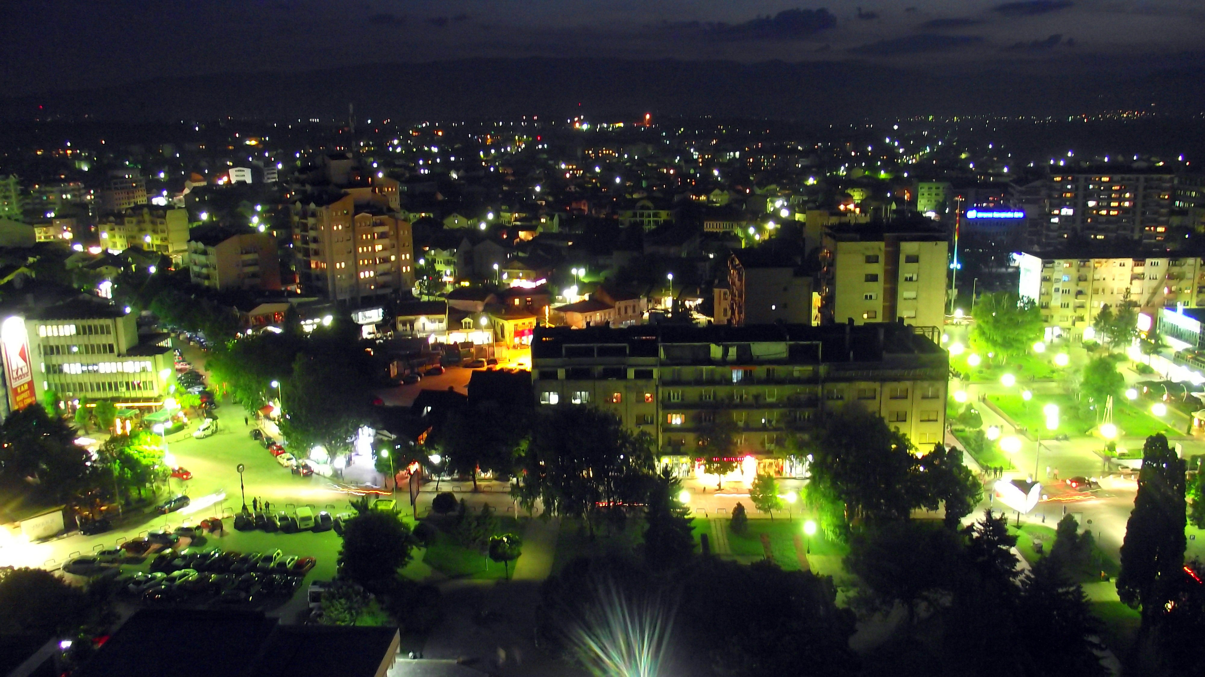 Kumanovo slikano od najvisokata zgrada navecer